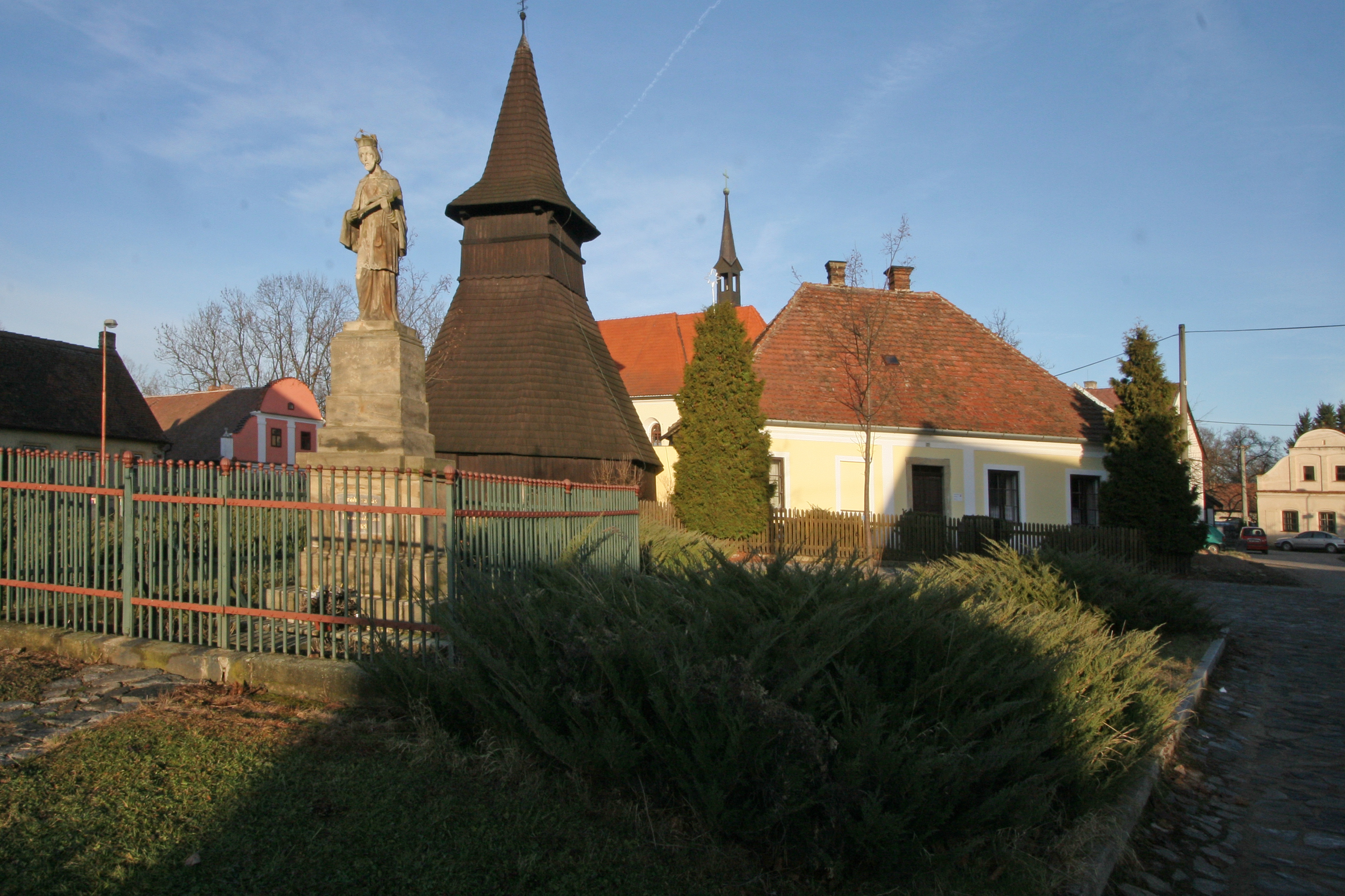 Třebosice Svatý Jan Nepomucký